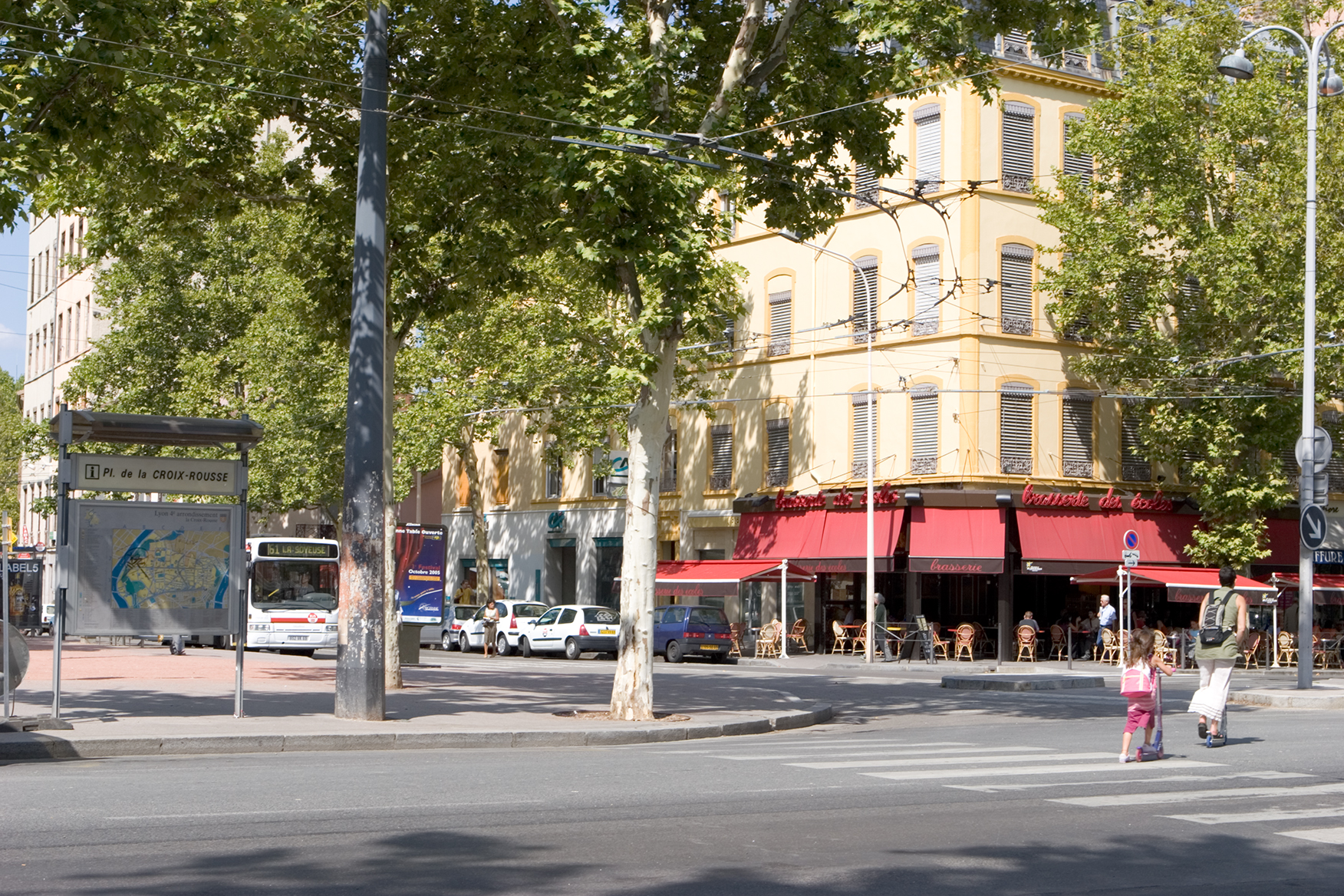 place de la Croix Rousse, Lyon, France.